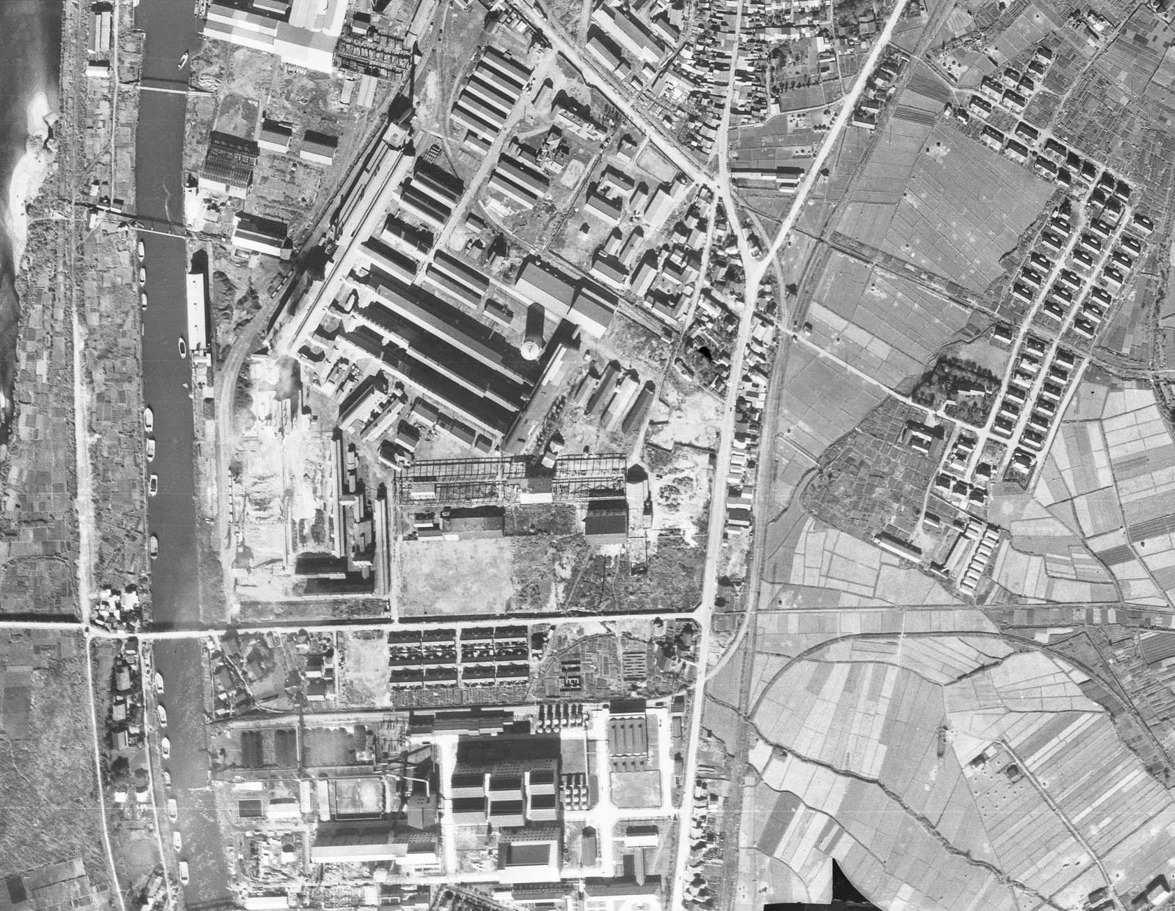 1952年（昭和27年）11月10日、米軍による撮影